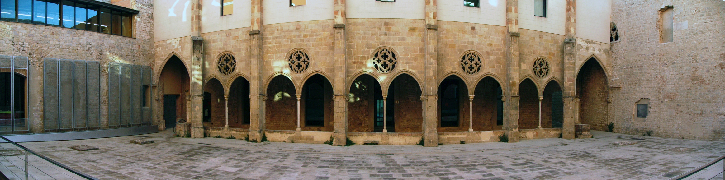 El centro cívico de "Ciutat Vella" es un local socio-cultural público que se emplaza en el barrio, con el mismo nombre, de Barcelona. Esta foto es una panorámica de su patio interior. Es una galería del antiguo claustro gótico (s. XIV) del Convento de Sant Agustín Viejo